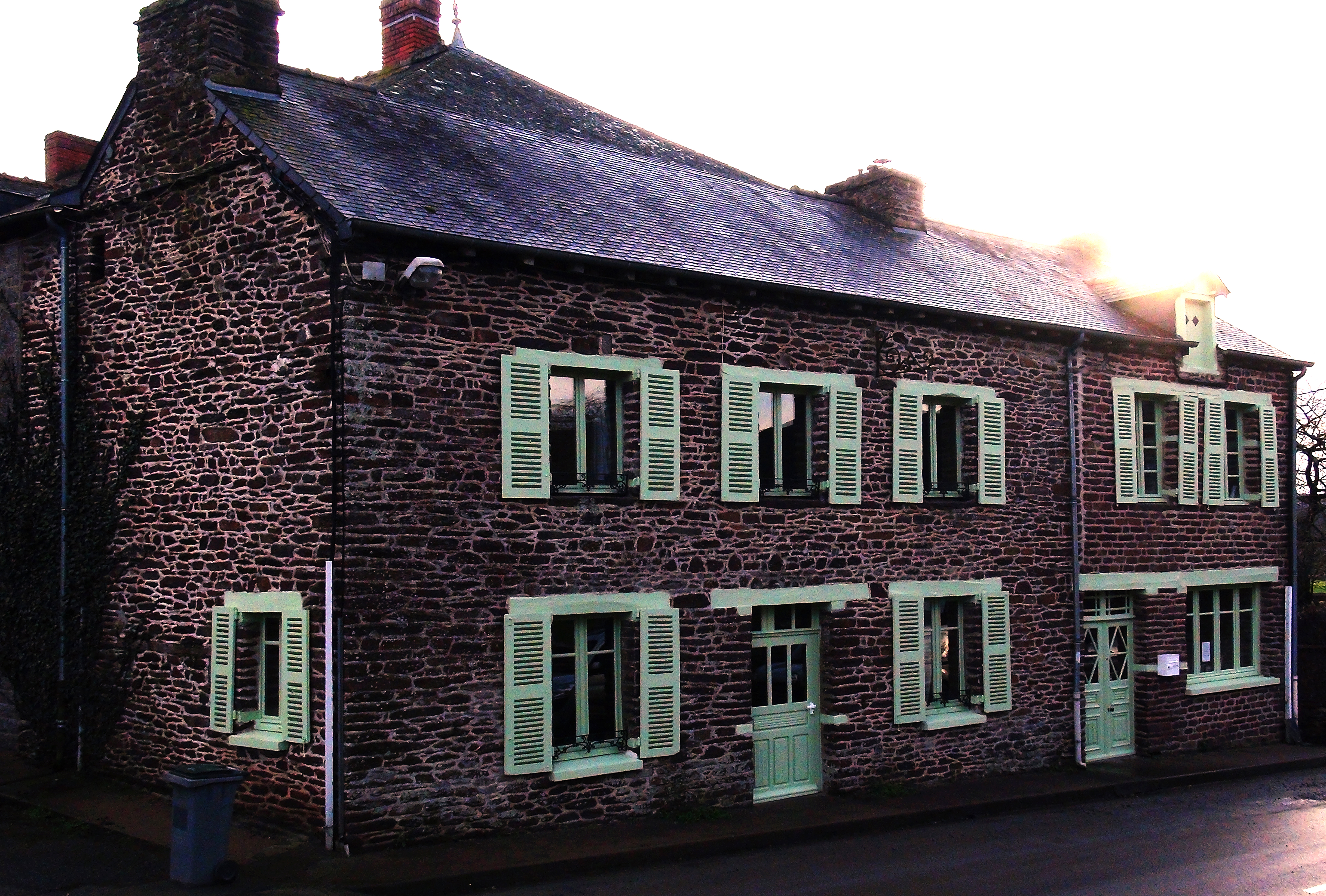 La Petite Maison des Légendes dans le bourg de Concoret en 2013.